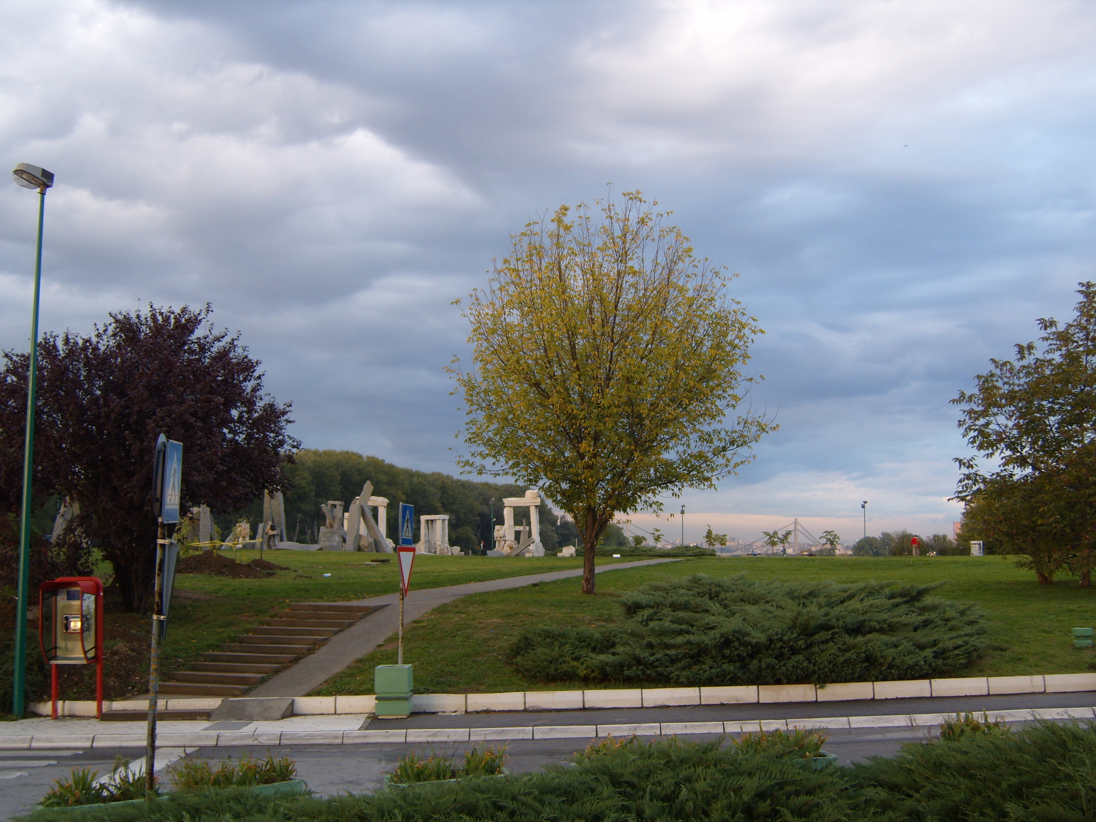 Ada Ciganlija isthmus, Belgrade, Serbia